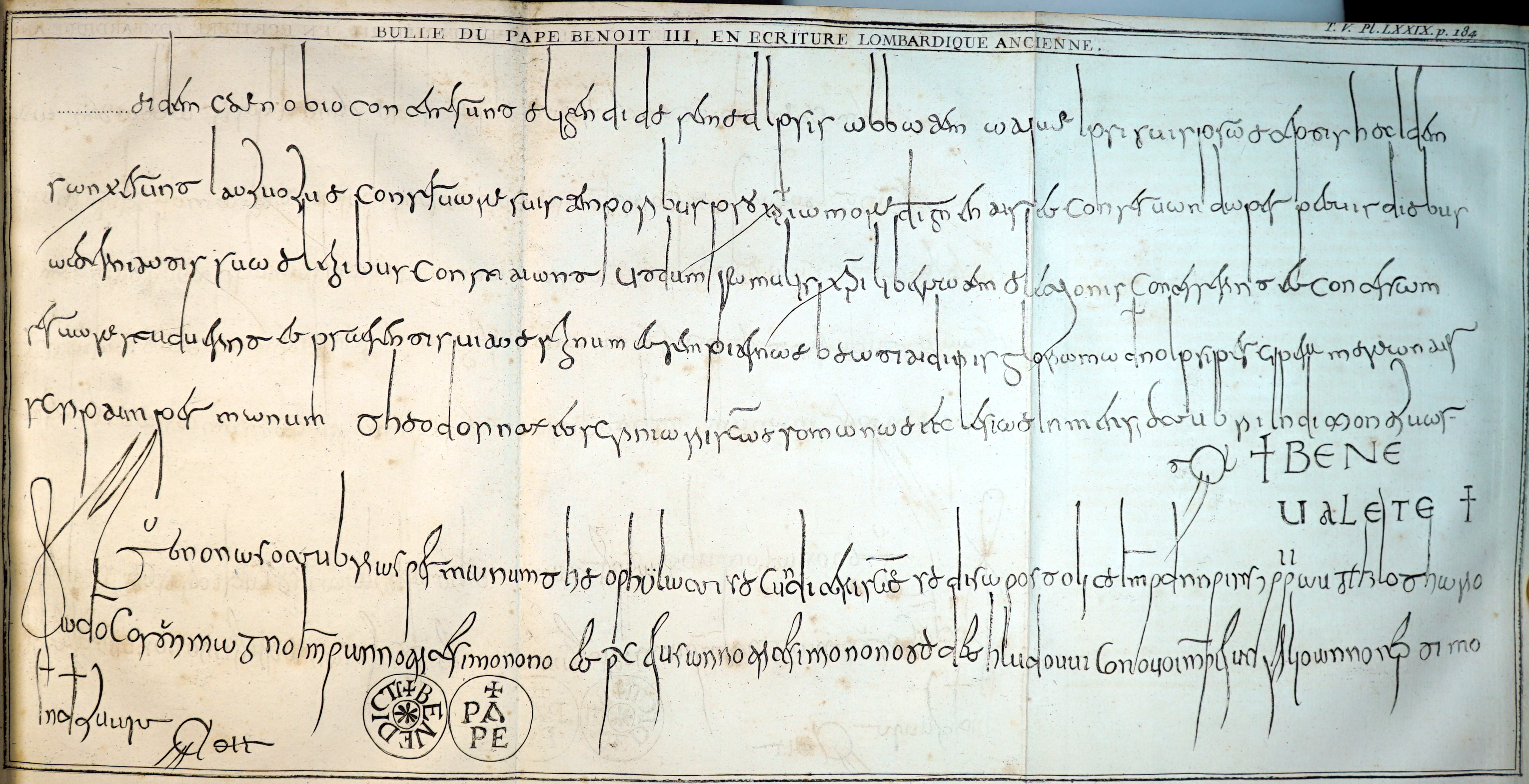 provenant de "Nouveau traité de diplomatique, où l'on examine les fondemens de cet art..."